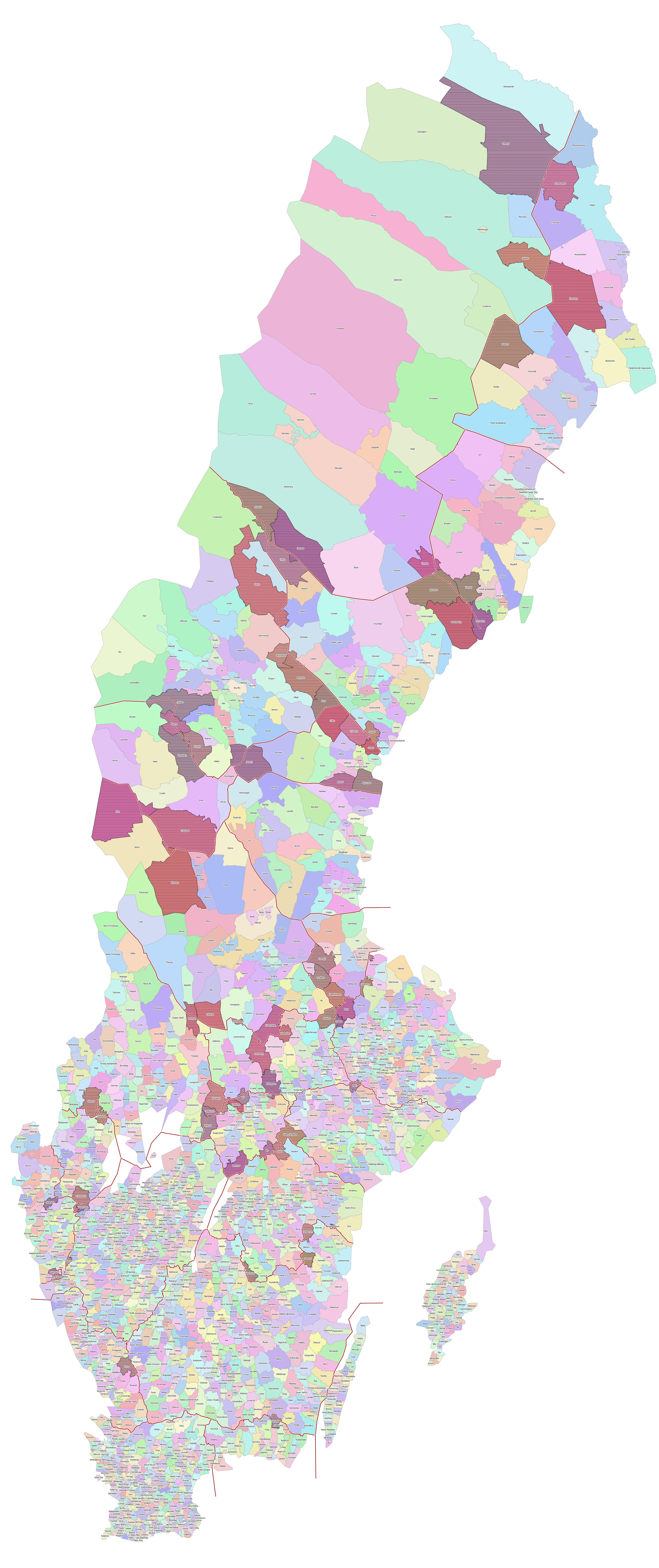 Distrikten med landskapsgränser. Distrikt som skärs av landskapsgräns är markerade med mörkare färg och vågrät linjering.